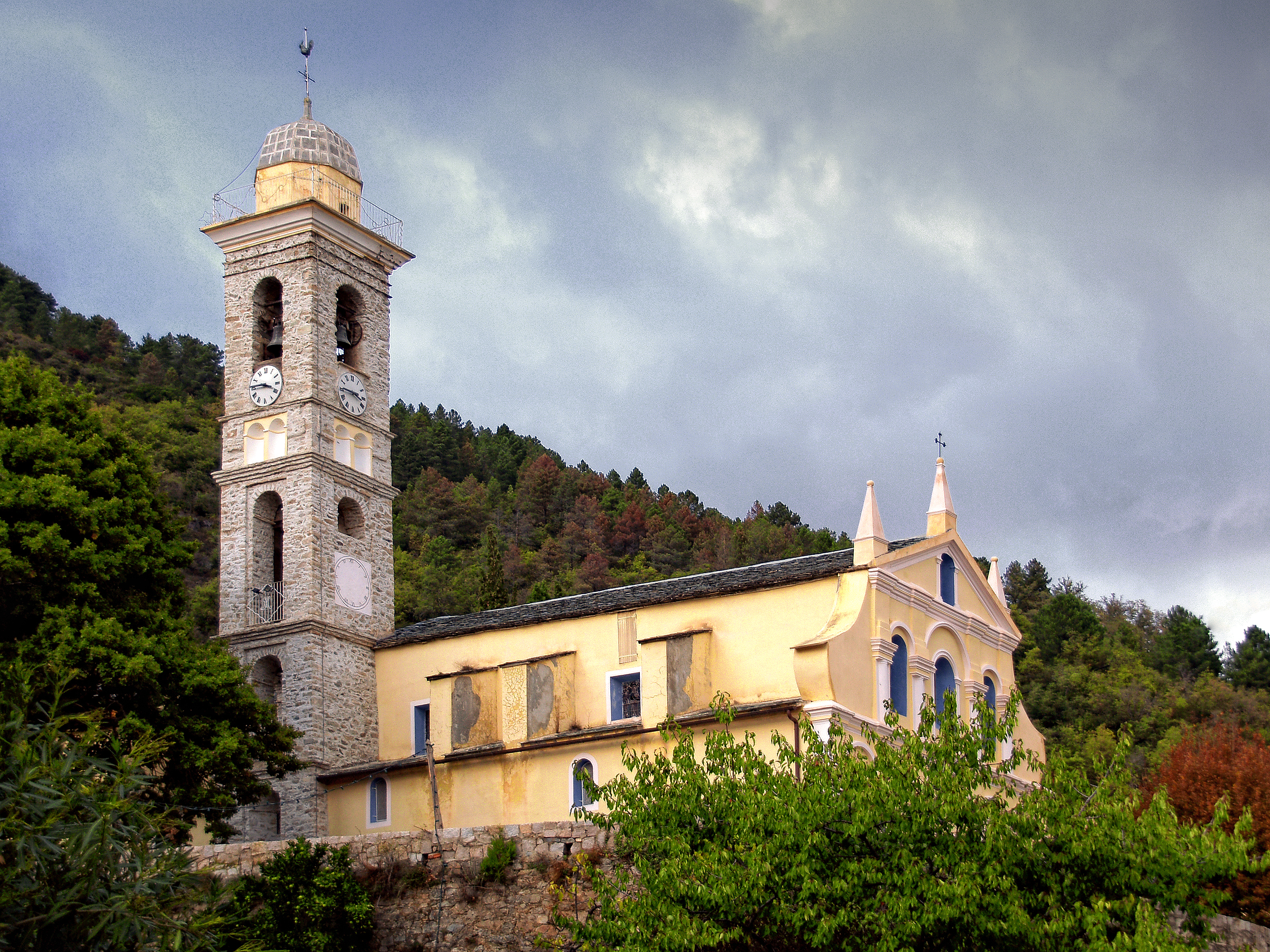 Venaco, Centre Corse - L'église paroissiale Saint-Michel